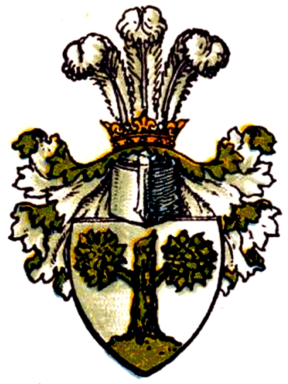 Wappen derer von Lindequist